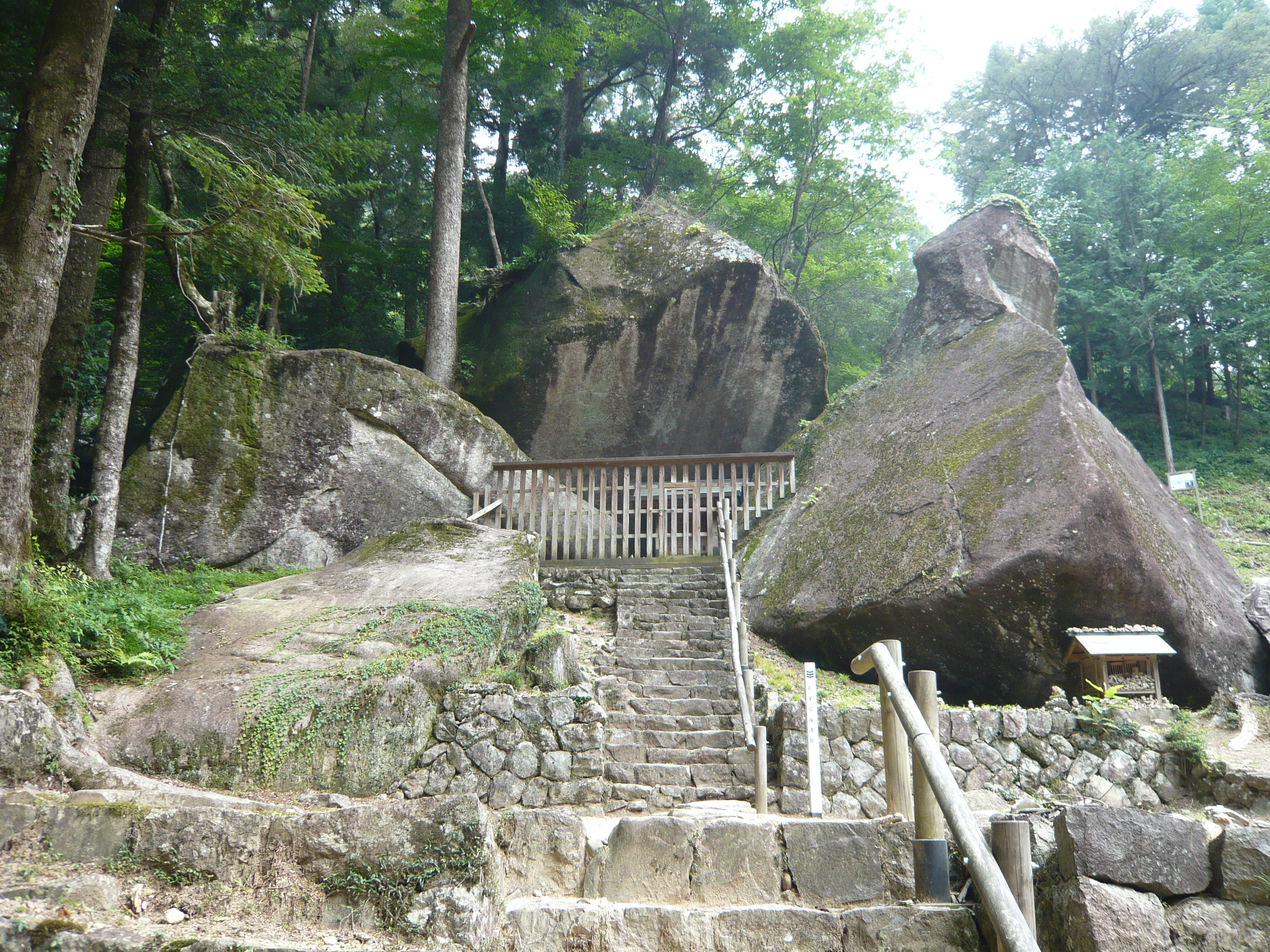 岩屋岩蔭遺跡（妙見神社）、金山巨石群